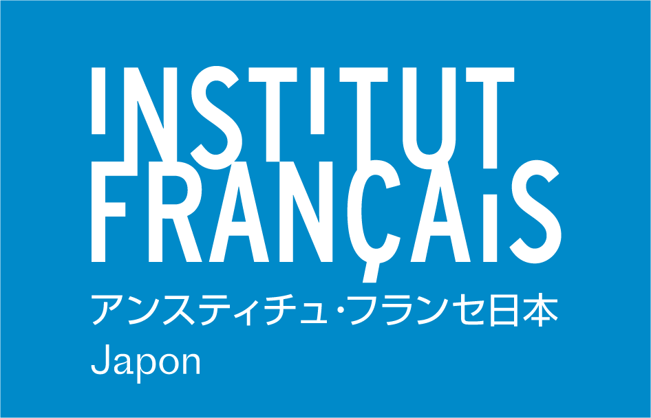 アンスティチュ・フランセ日本の2017年からのロゴ